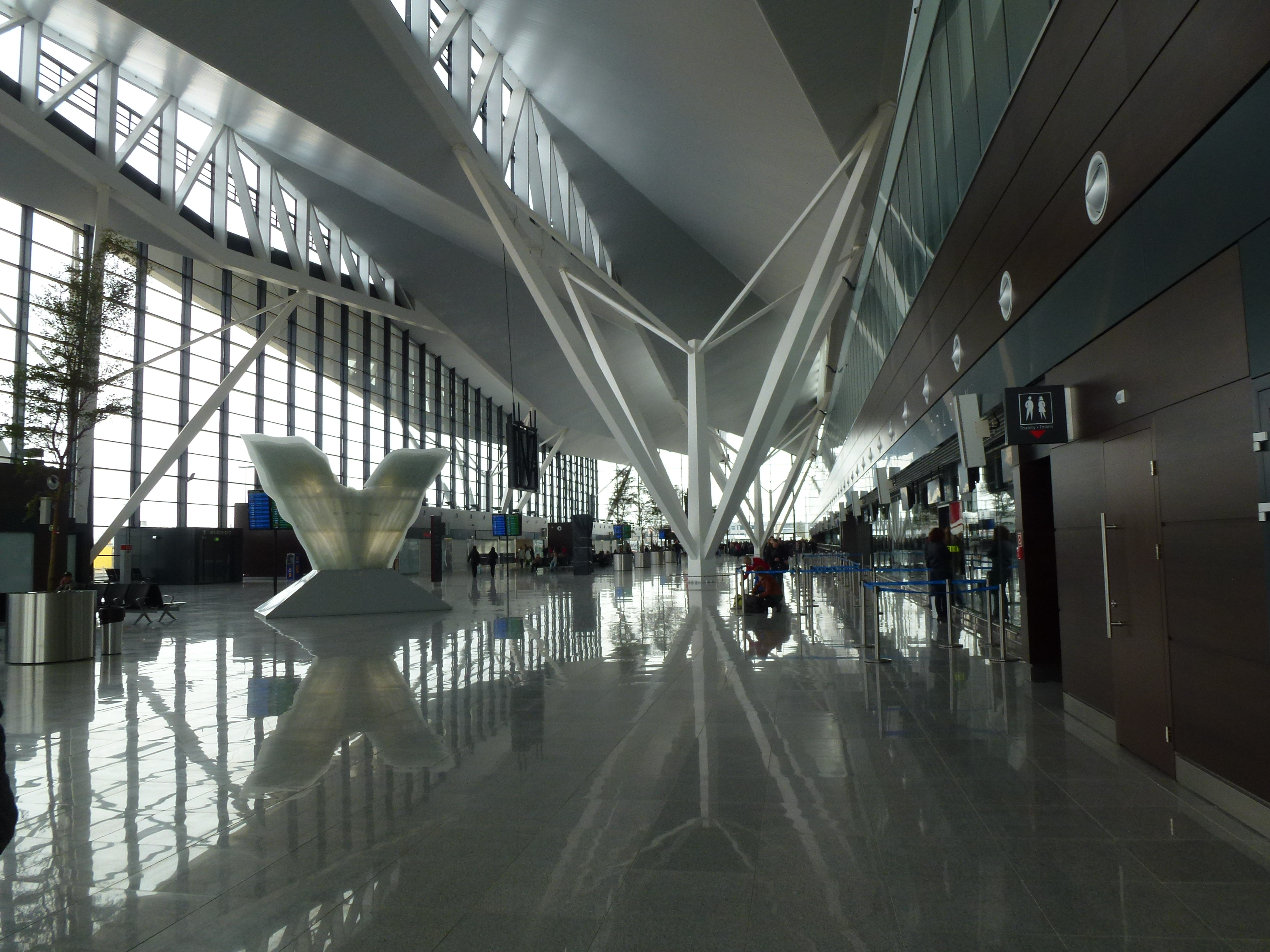 Gdańsk-Lotnisko im. Lecha Wałęsy-Terminal II